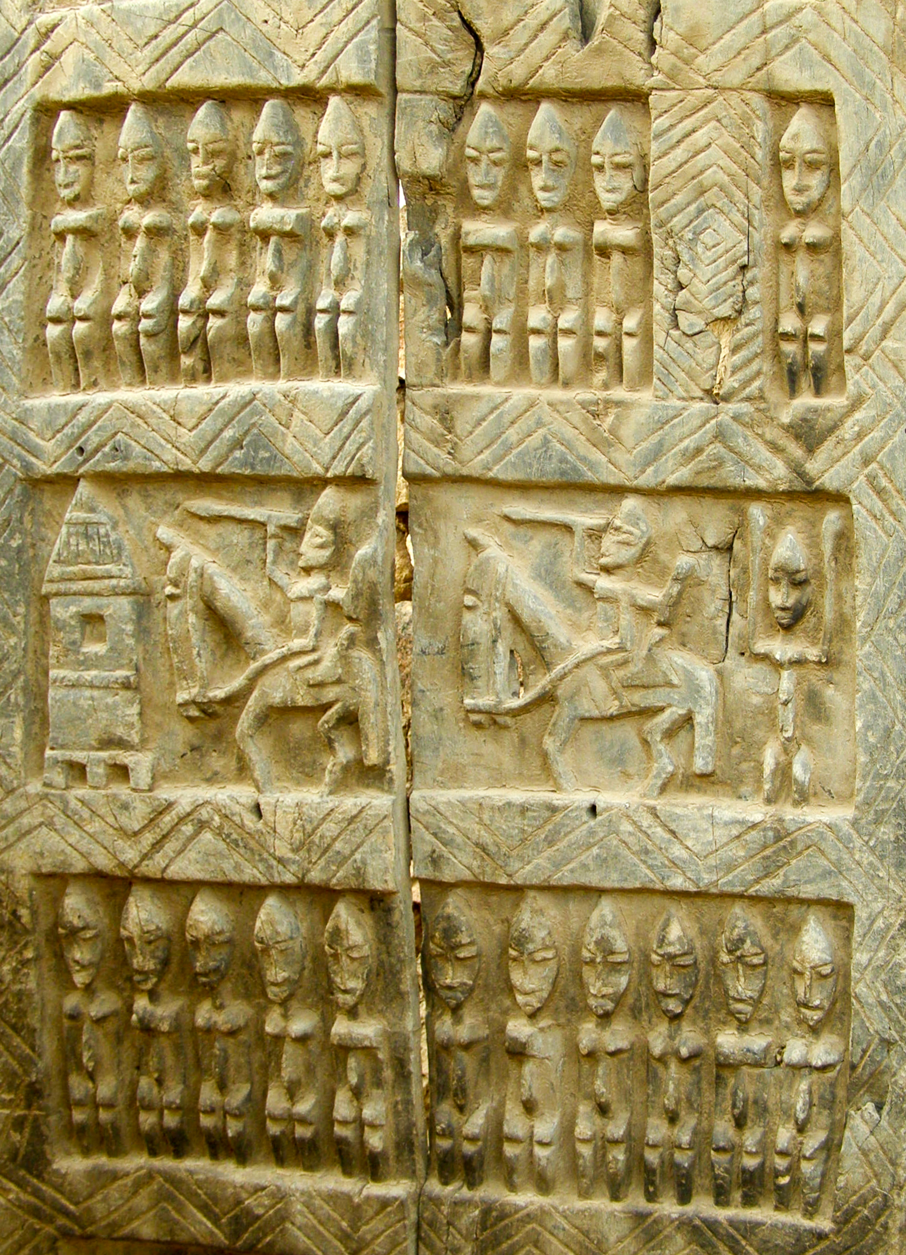 Porte de la case du Hogon du village de Sangha - Quartier de Ogol - Pays Dogon - Mali